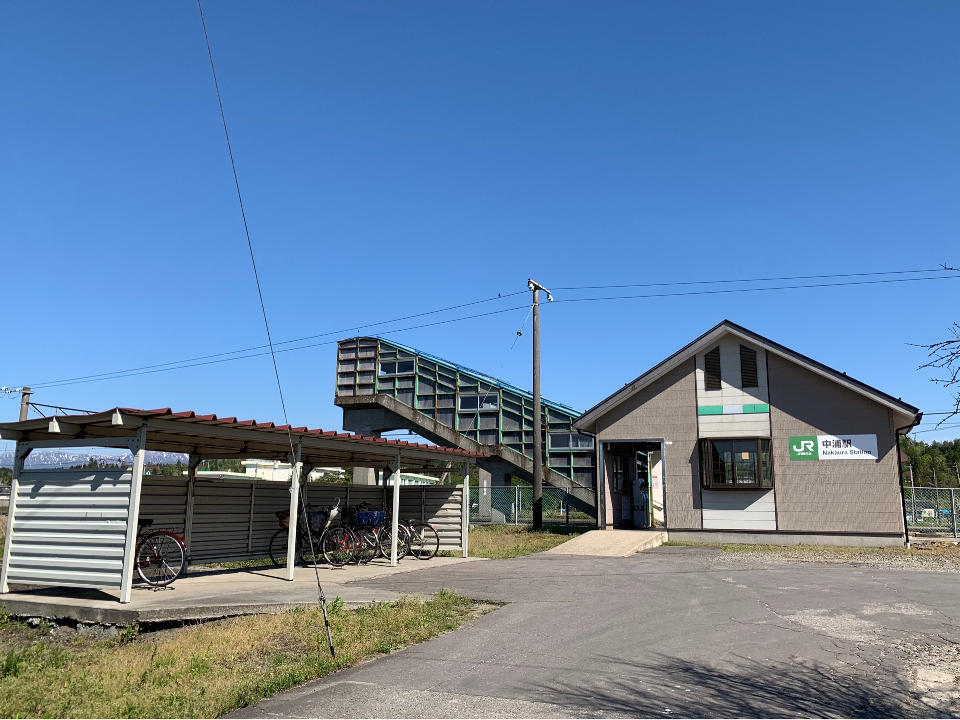 中浦駅 駅舎（2019年5月）